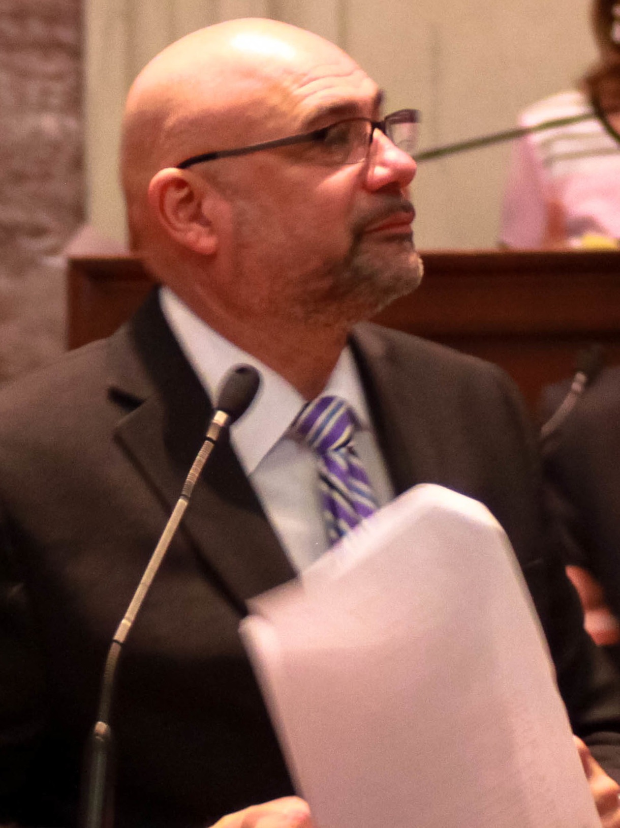 Joe Armstrong